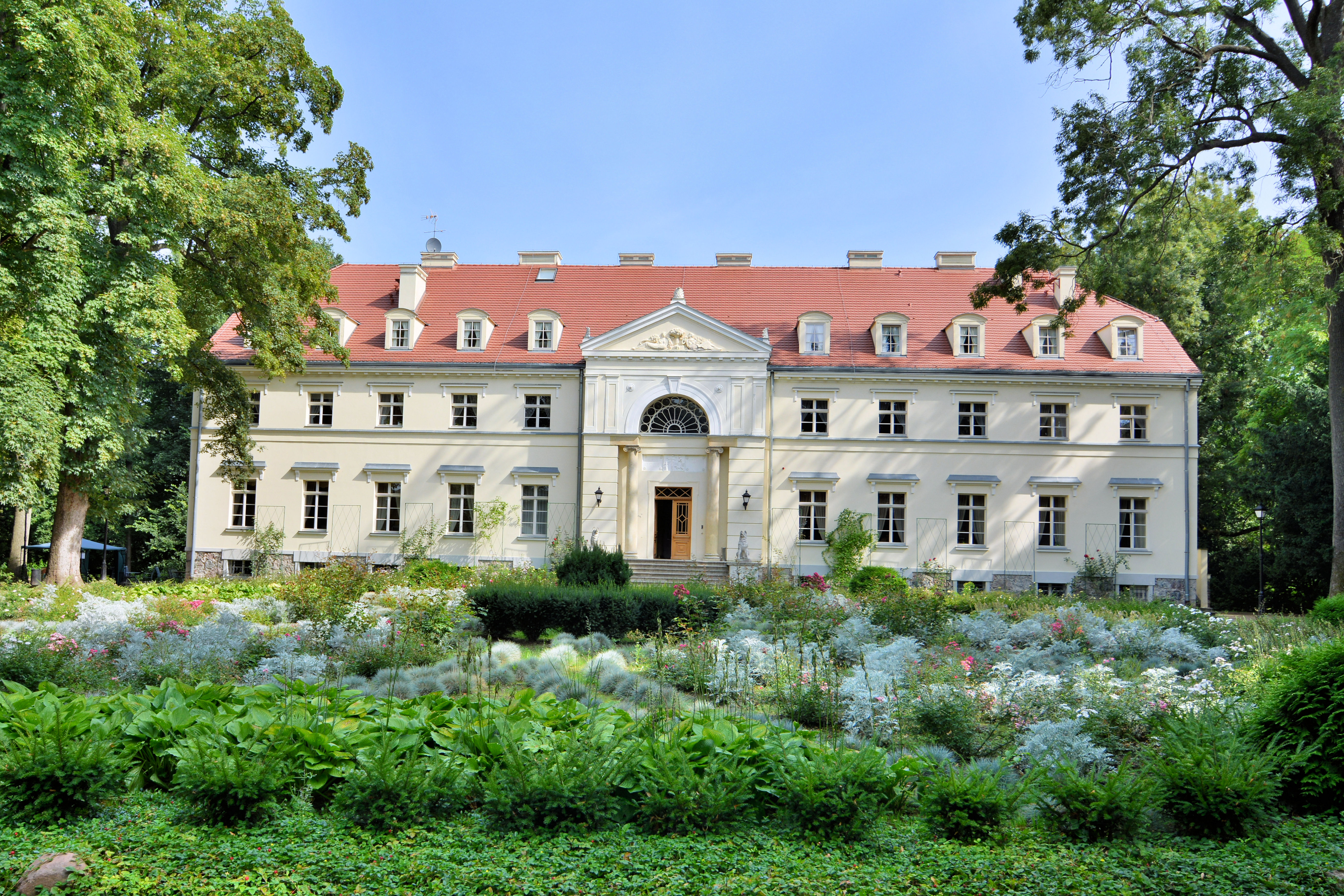 Pałac w Ogrodzie Dendrologicznym w Przelewicach